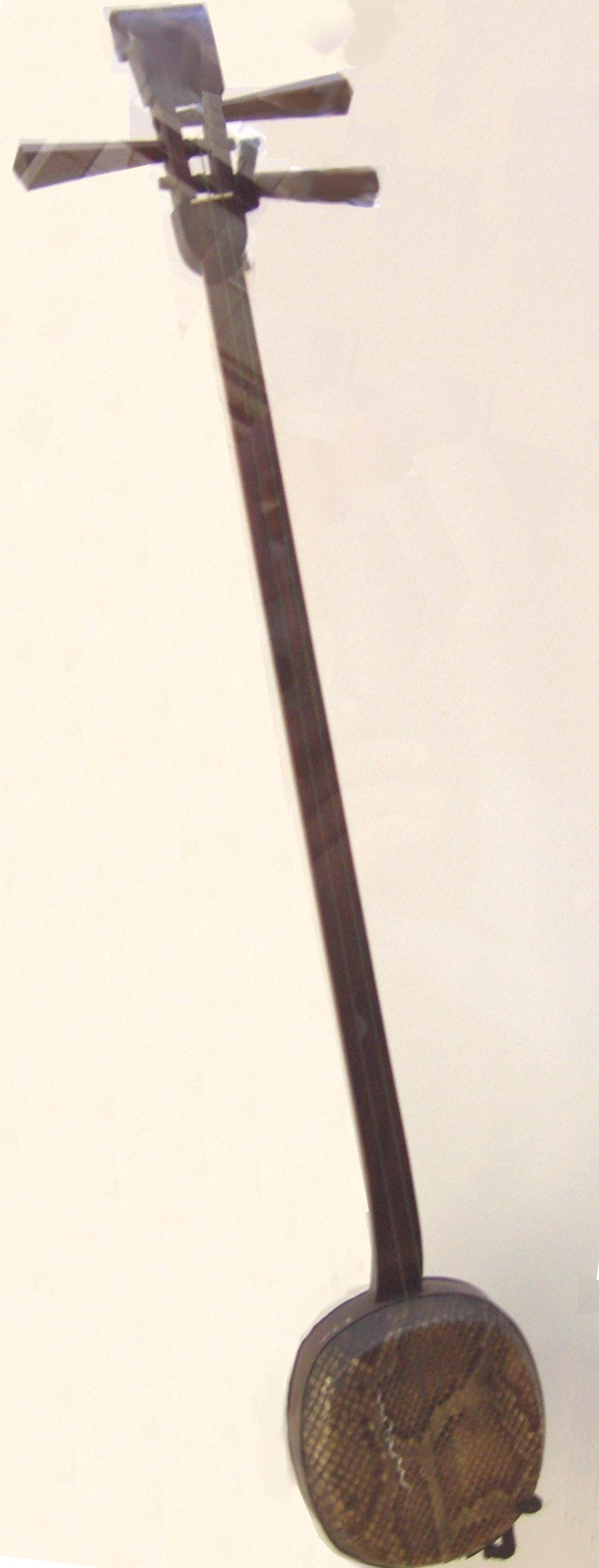 Sanxian Traditionelle chinesische Laute Qing-Dynastie Fotograf:de:Benutzer:Dr. Meierhofer Datum: 19.08.2006